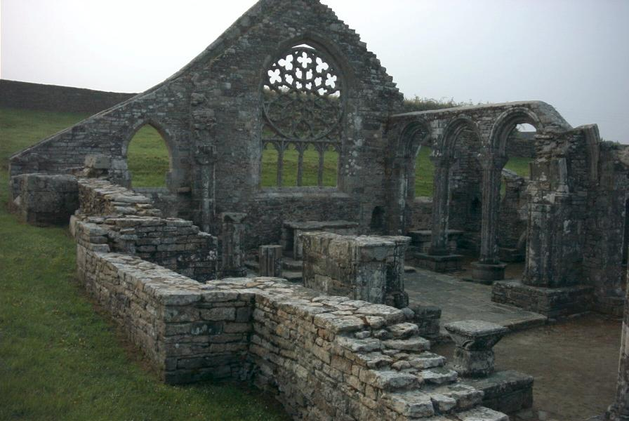 Chapelle de Languidou : restes du mur nord